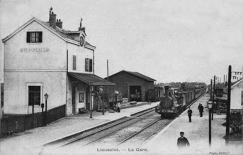 L'ancienne gare de Lieusaint du temps ou la ligne n'était constituée que de deux voies. Les infrastructures visibles : bâtiment voyageurs, hall marchandises et abri de quais ont aujourd'hui disparues au profit de nouvelles installations édifiées à quelques mètres sur la commune voisine.